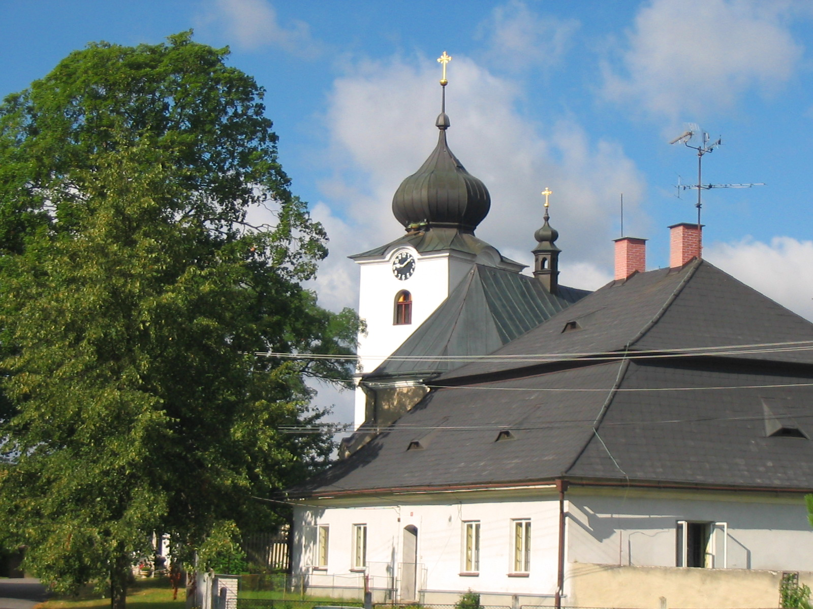 Pohled na kostel Sv. Mikuláše v Nížkově, před kostelem stojí nově opravená fara.